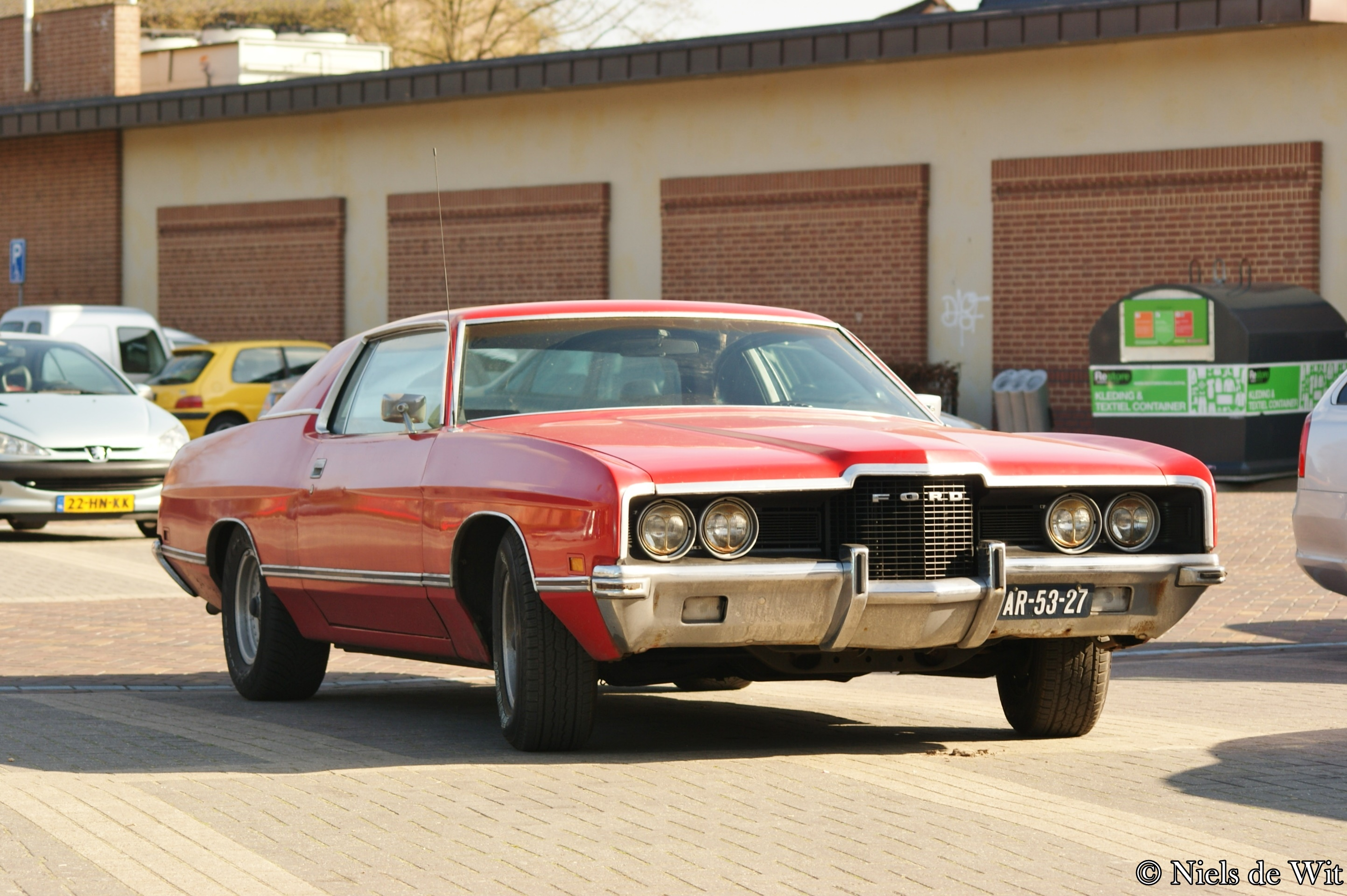 AR-53-27 Oranjeplein, Lunteren